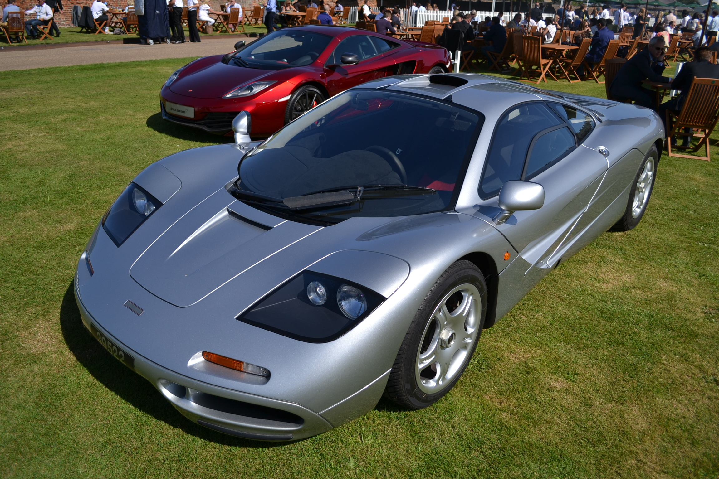 Salon Privé London 2012